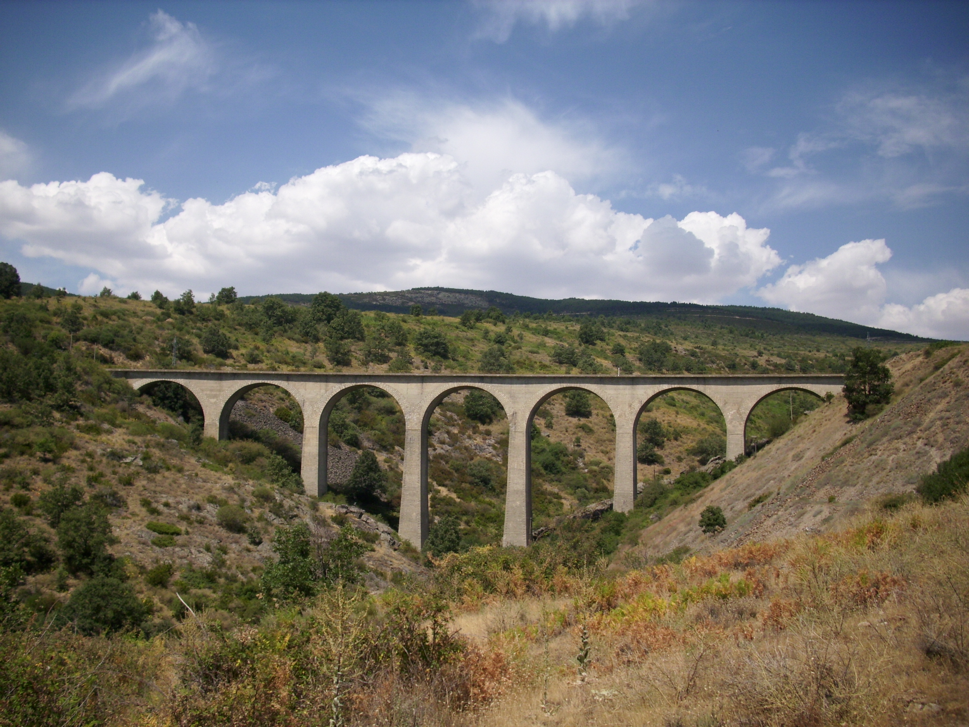 Viaducto del Ferrocarril Madrid-Aranda-Burgos en el lado Madrid de la estación de Robregordo-Somosierra.